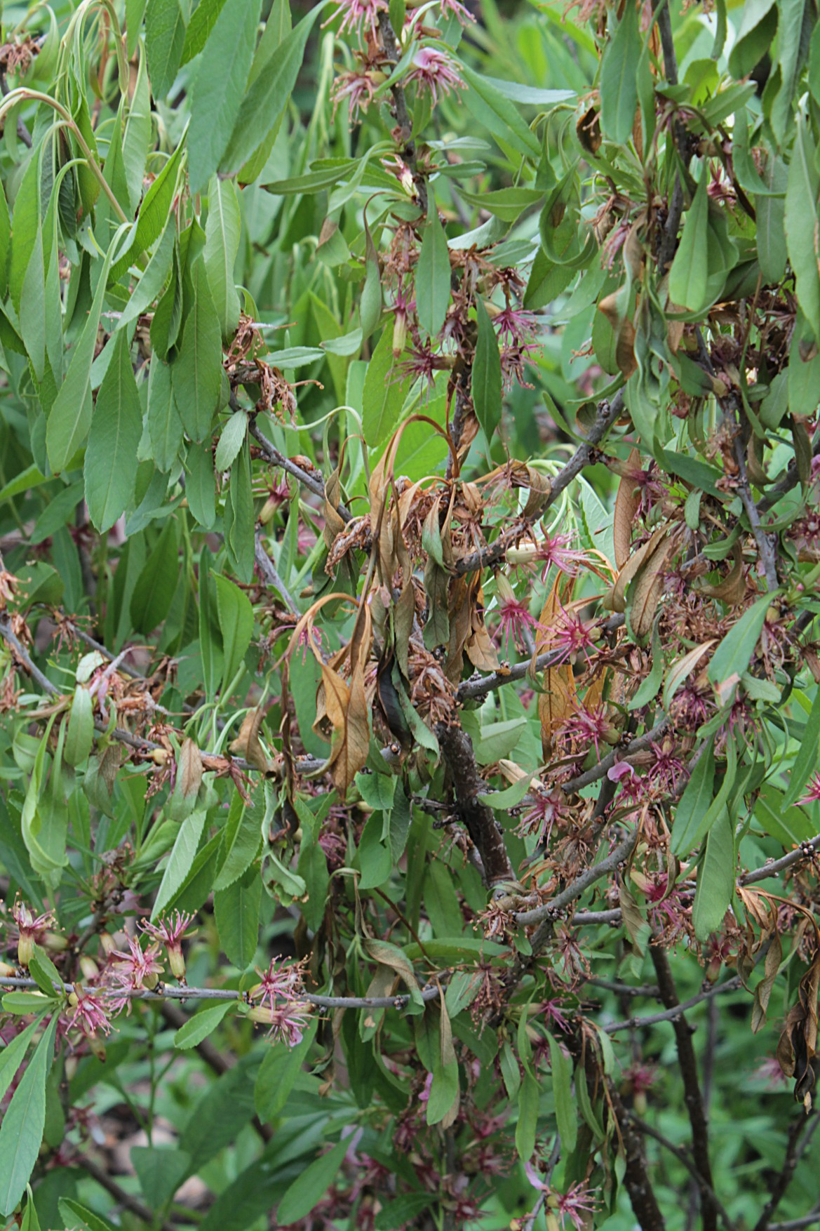 Monilia laxa na Prunus triloba, mandloň, jaro 2013